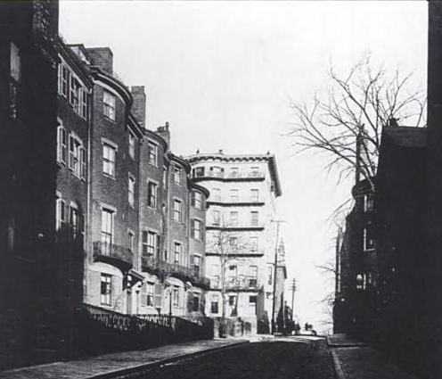 Boston, Massachusetts